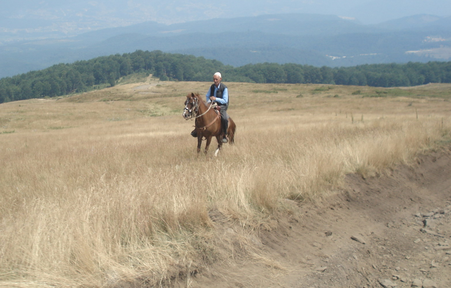 Highlander